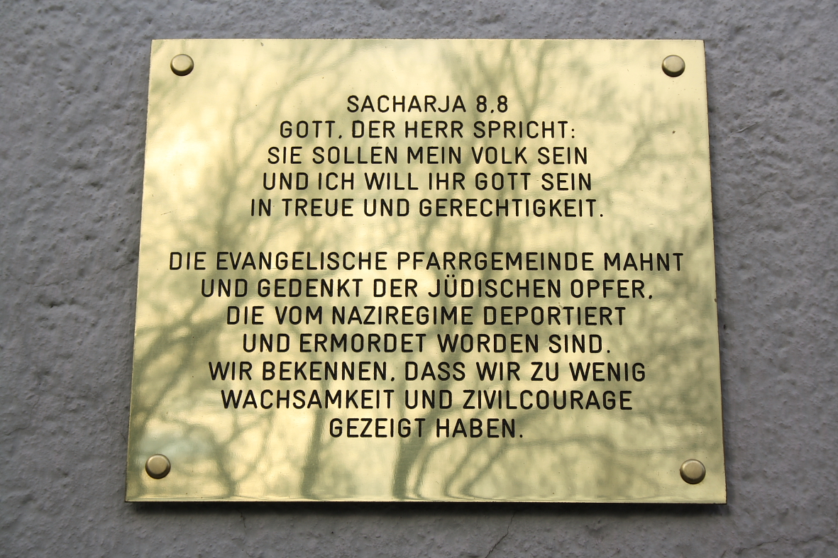 Die Mahn- und Gedenktafel am Portal der Verklärungskirche im 2. Wiener Gemeindebezirk Leopoldstadt.